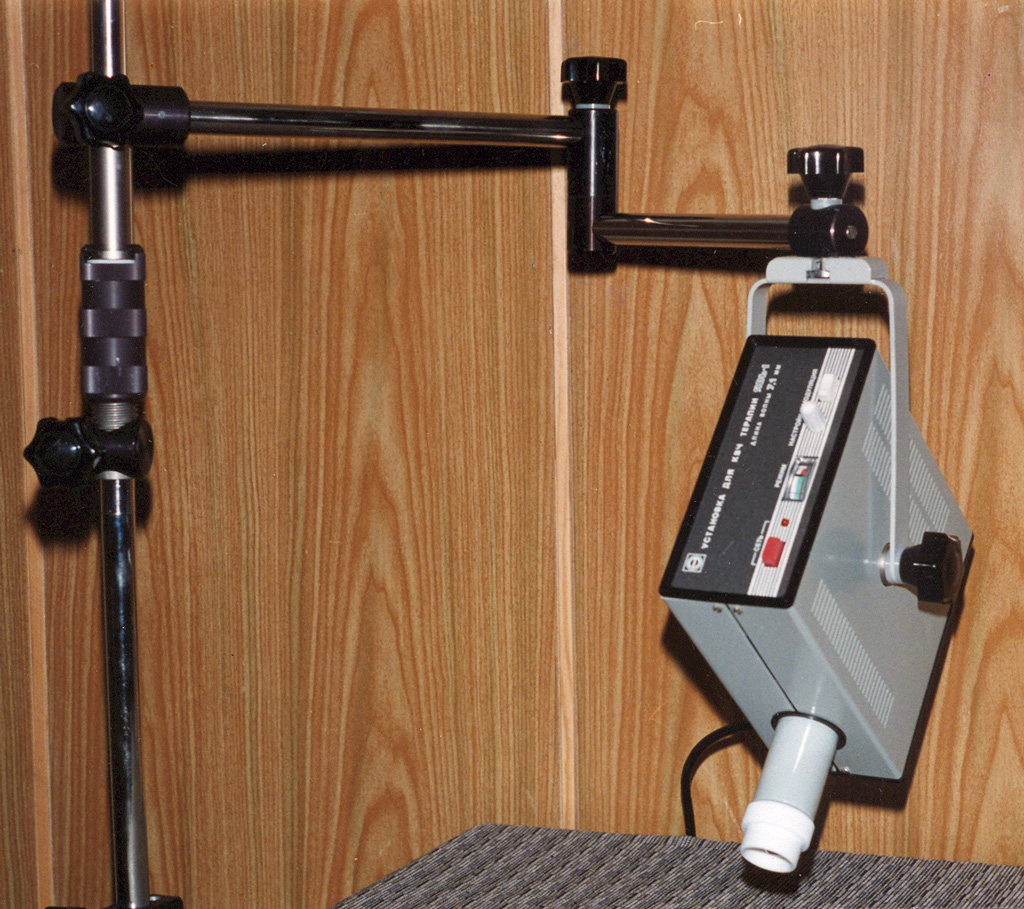 Аппарат для КВЧ терапии "Явь-1" на штативе.